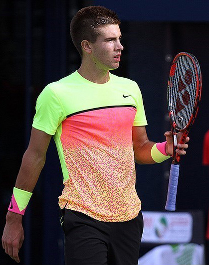 برنا کوریچ در مسابقات تنیس 2015 دوبی